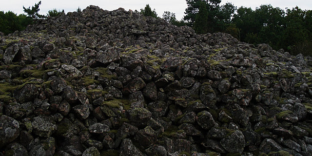 Röset på Målarberget (RAÄ-nr Edestad 32:1) i Edestads socken, Medelstads härad, Ronneby kommun, Blekinge, Sverige.